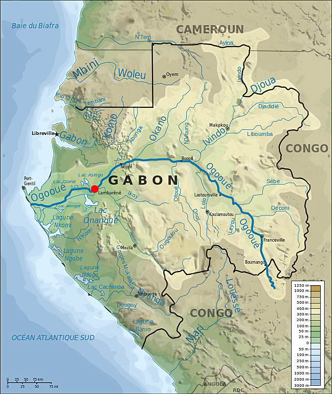 Localisation de Lambaréné sur une carte topographique du Gabon.